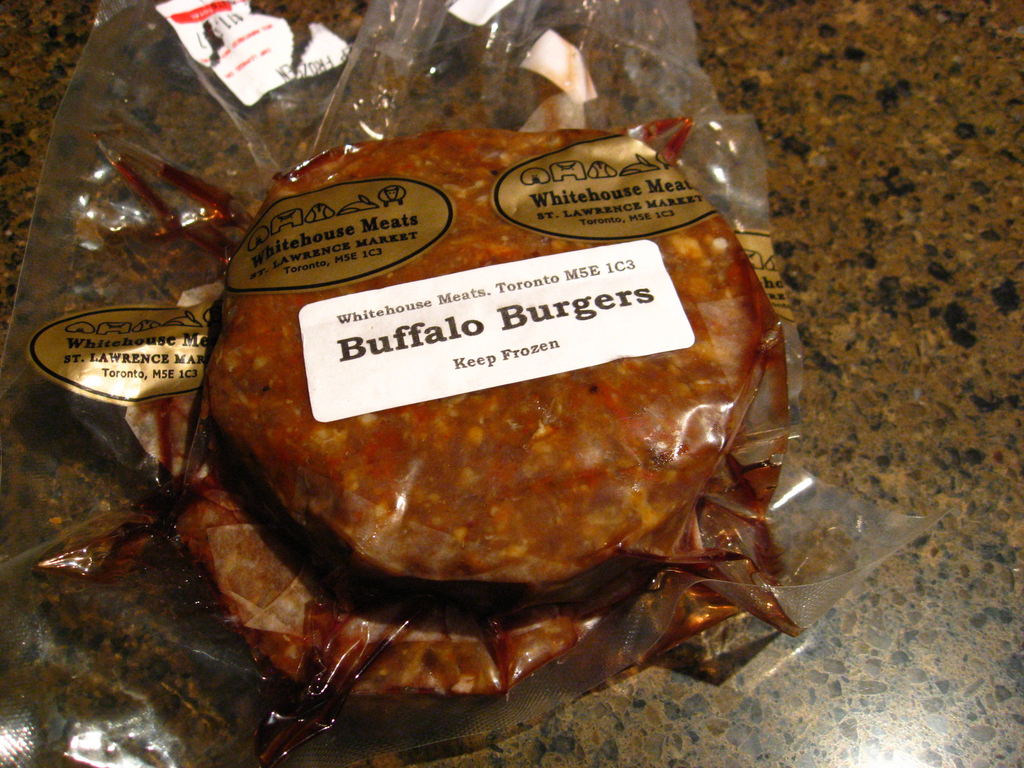 Frozen buffalo burger patties